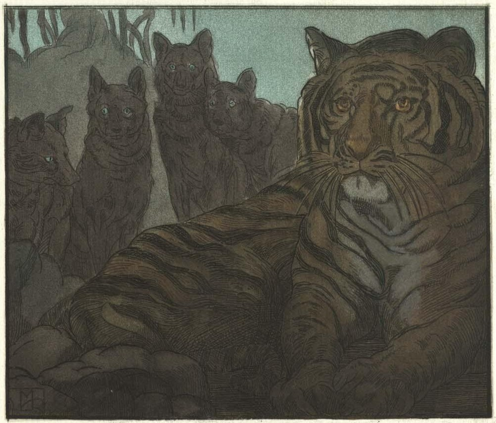 Illustration du Livre de la jungle de Kipling.